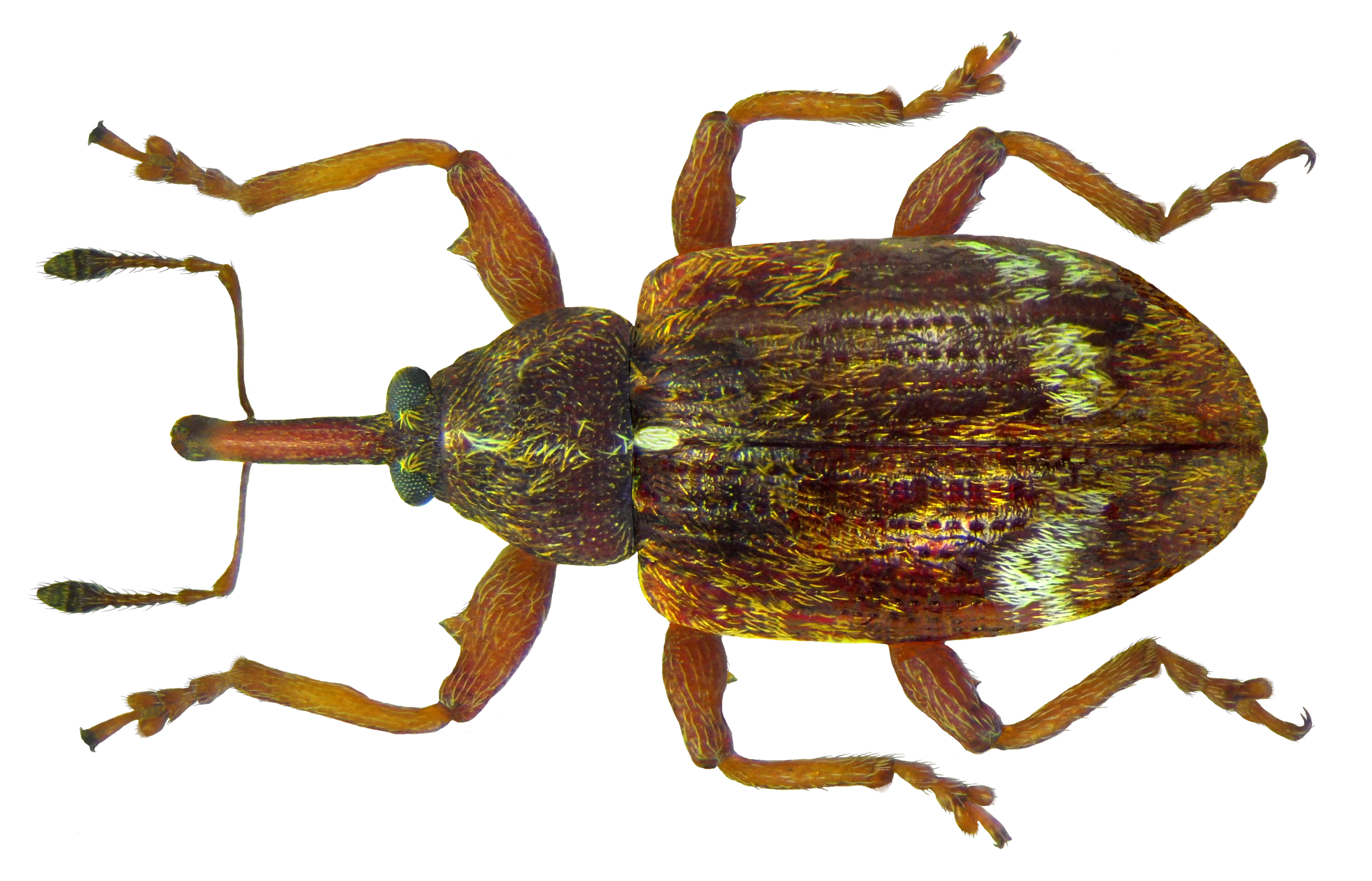 Familie: Curculionidae Groesse: 3,7 (2,9-3,8 mm) Verbreitung: Palaearktis Oekologie: an Crataegus Fundort: Germania, Bayern, Oberfranken, Selbitz leg.det. U.Schmidt, 7.VI.2004 Photo: U.Schmidt, 2012